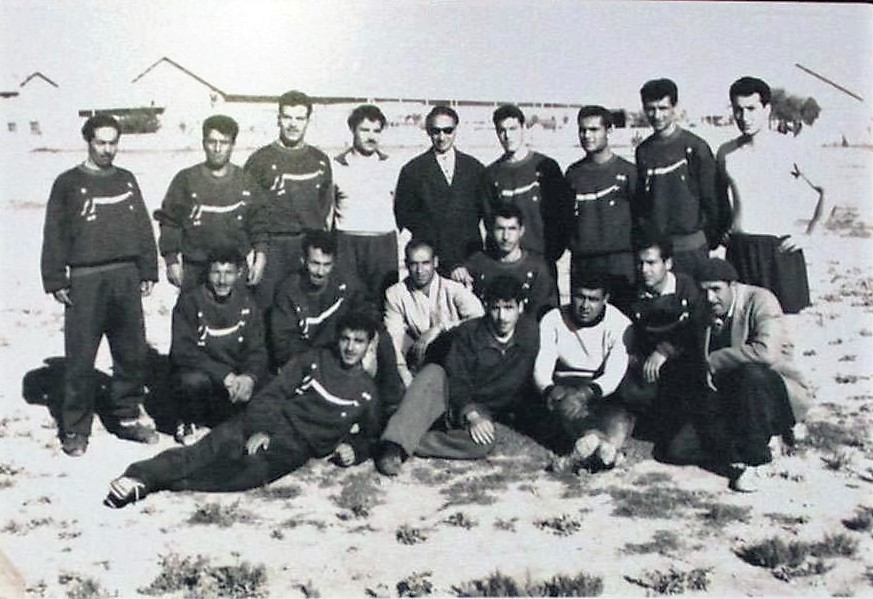 تیم منتخب تبریز در سال 1337 خورشیدی